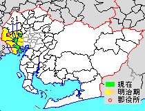 愛知県海部郡の範囲